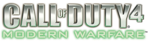 Offizielles Logo des Computerspiels Call of Duty 4: Modern Warfare. Erschien am 10. November 2009. Veröffentlicht von Activision © (C)